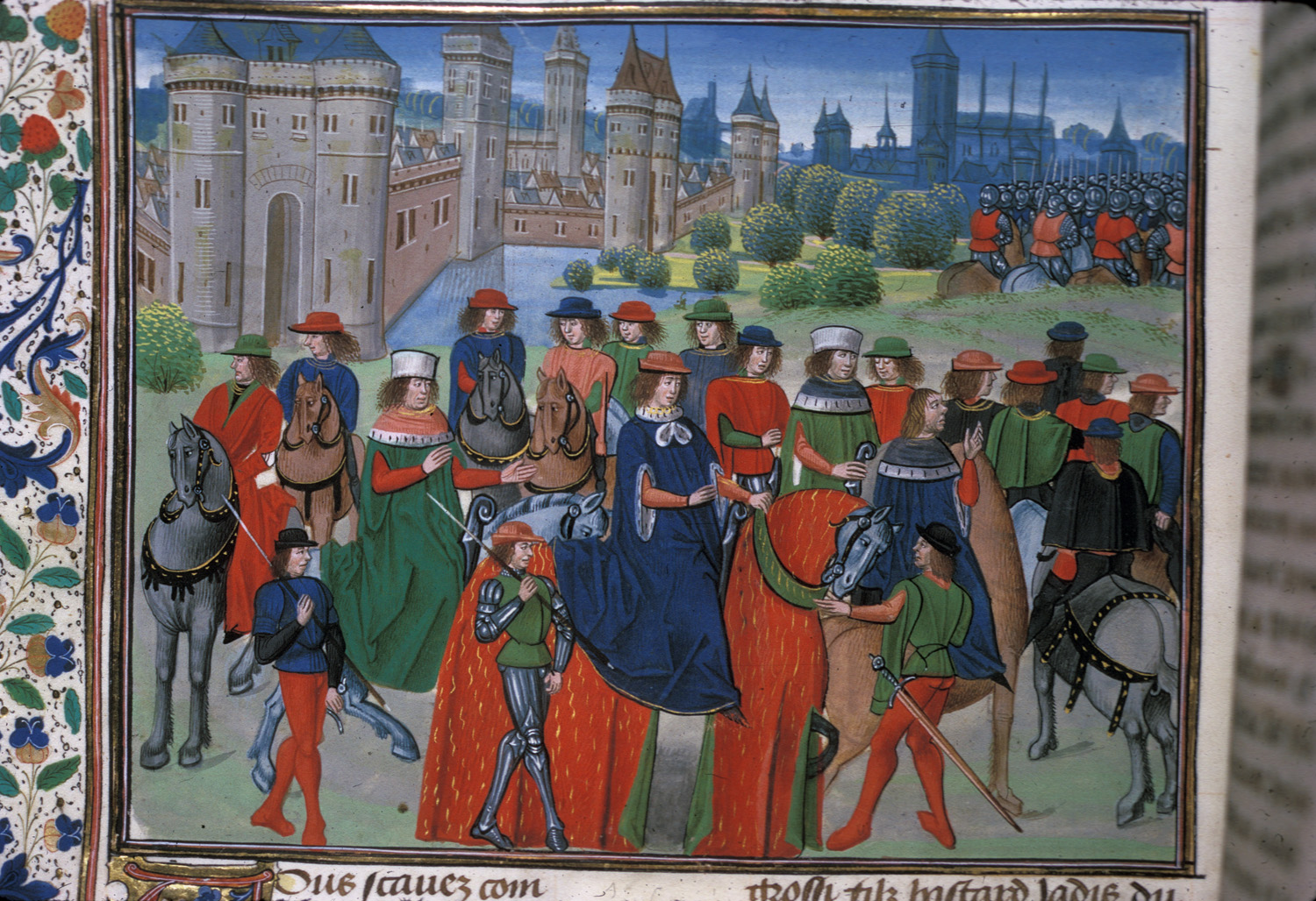 F226v-Richard II